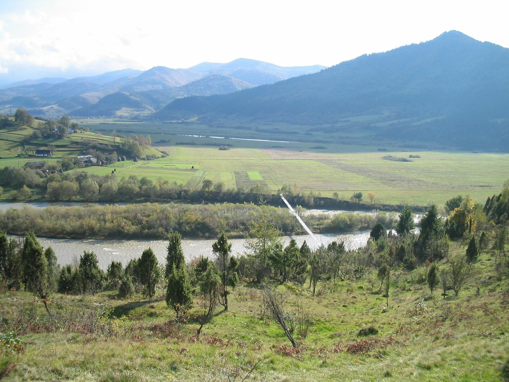 с. Рибник, Дрогобицький р-н